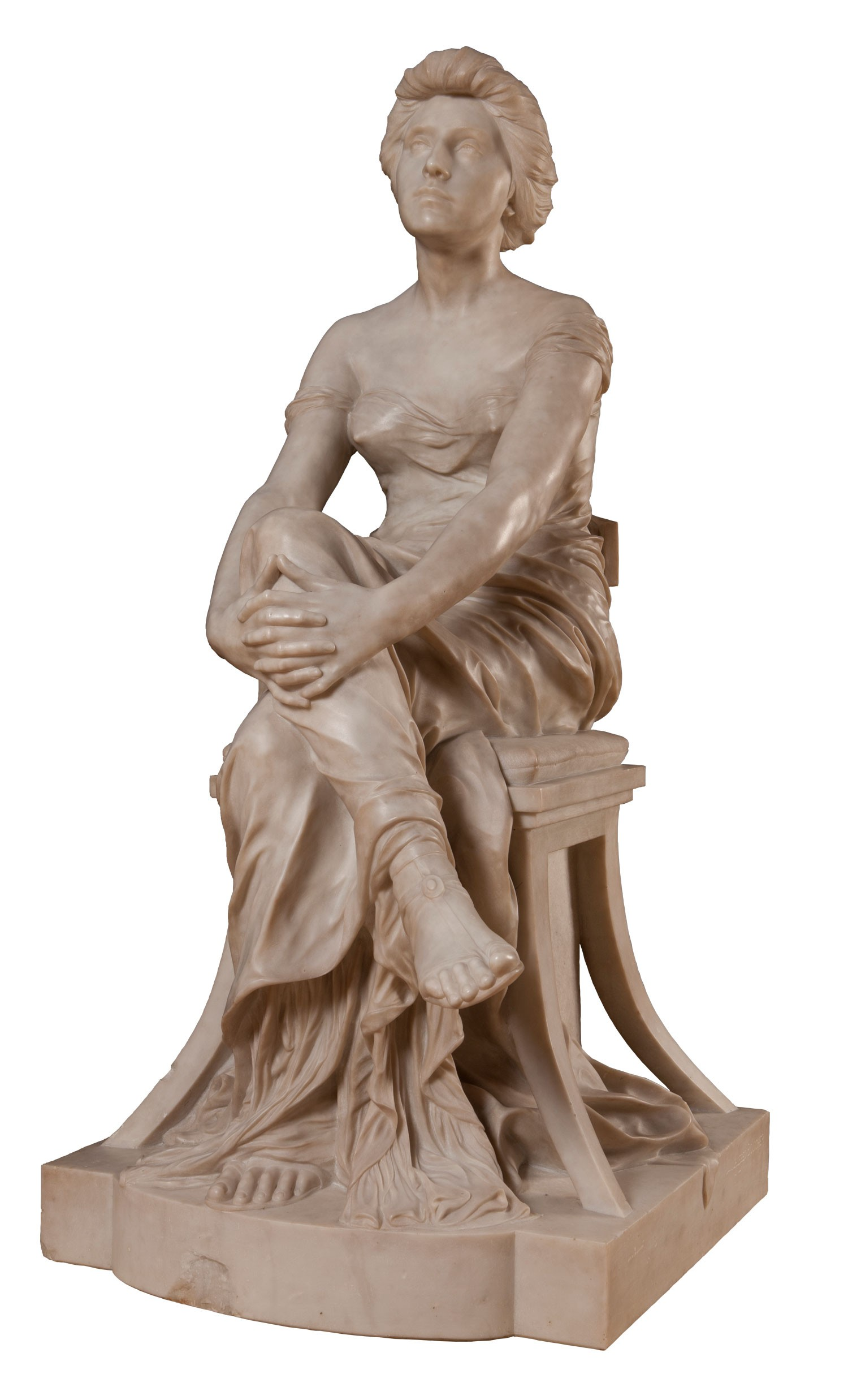 Alfred Boucher, Figura de mujer sentada. Siglo XIX. 144 x 70 x 82 cm, talla en mármol. Inv. 7724.